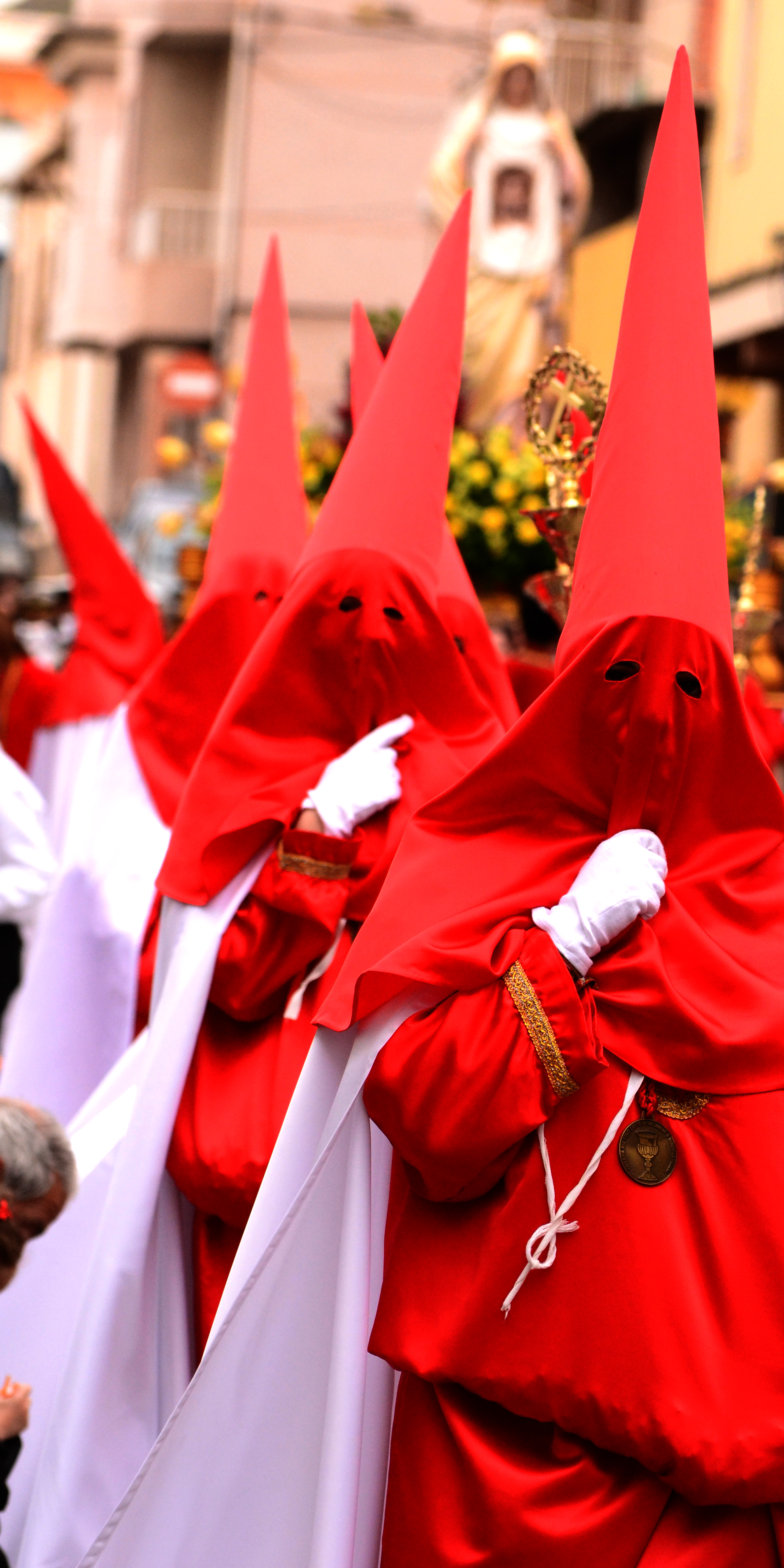 Nazarenos acompañando a la Verónica en Archena